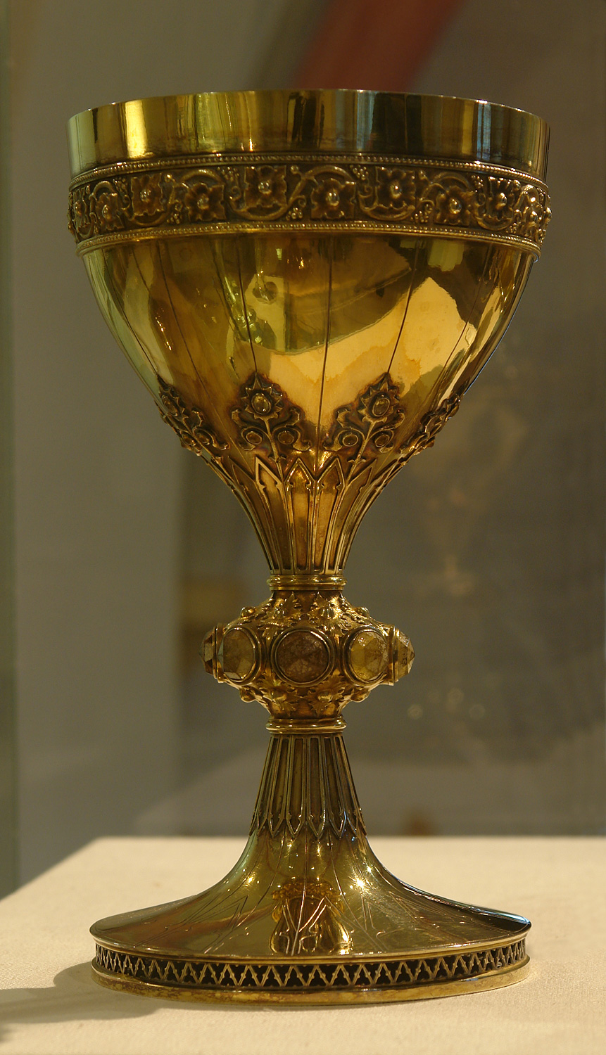 Bremer Dom-Museum: Abendmahlskelch, 1848